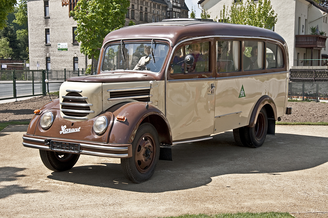 Robur Garant 30 K Omnibus (1960).